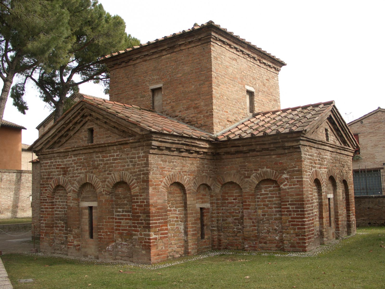 Ravenna, Italia